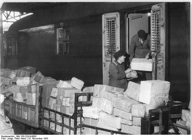 Zentralbild Junge 23.11.1953 Erhöhter Paketverkehr zum Weihnachtsfest In dem Berliner Paketpostamt O 17 am Ostbahnhof haben die Kollegen jetzt alle Hände voll zu tun,um die Geschenkpakete zum Weihnachtsfest rechtzeitig zum Empfänger zu leiten. UBz: Hier wird der Interzonenpostwagen mit Paketen beladen, denn viele Geschenksendungen gehen auch nach Westdeutschland.